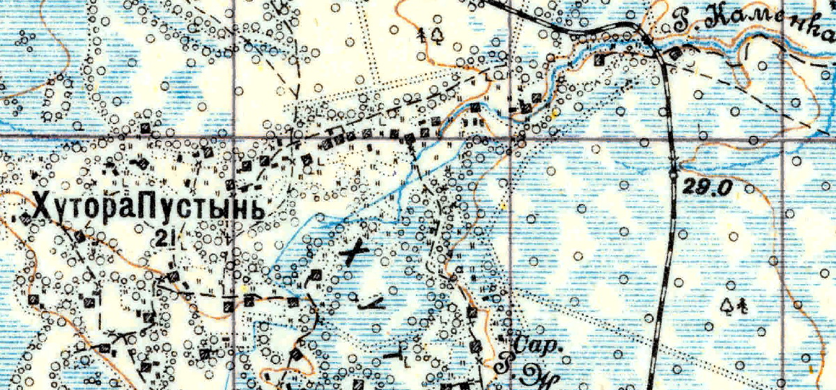 Топографическая карта Ленинградской области, квадрат VIc (Красные Горы), деревня Пустынь